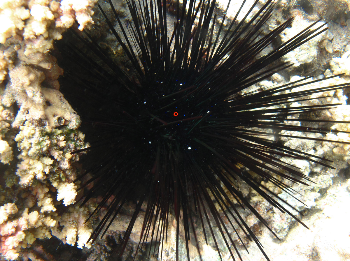 La face aborale (supérieure) d'un oursin-diadème de l'Indo-Pacifique (Diadema setosum) très caractéristique, observé à la Réunion.